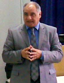 Azərbaycan Respublikasının "Əməkdar jurnalist"i Qulu Məhərrəmli